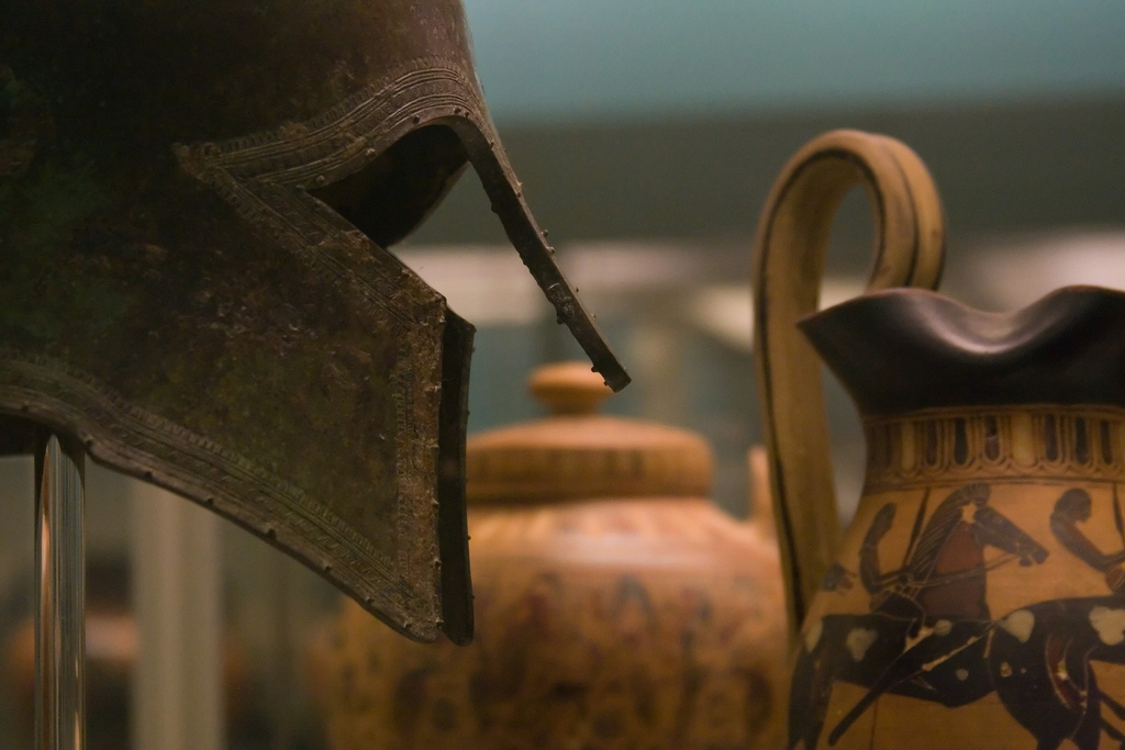 Antiguo casco griego de bronce